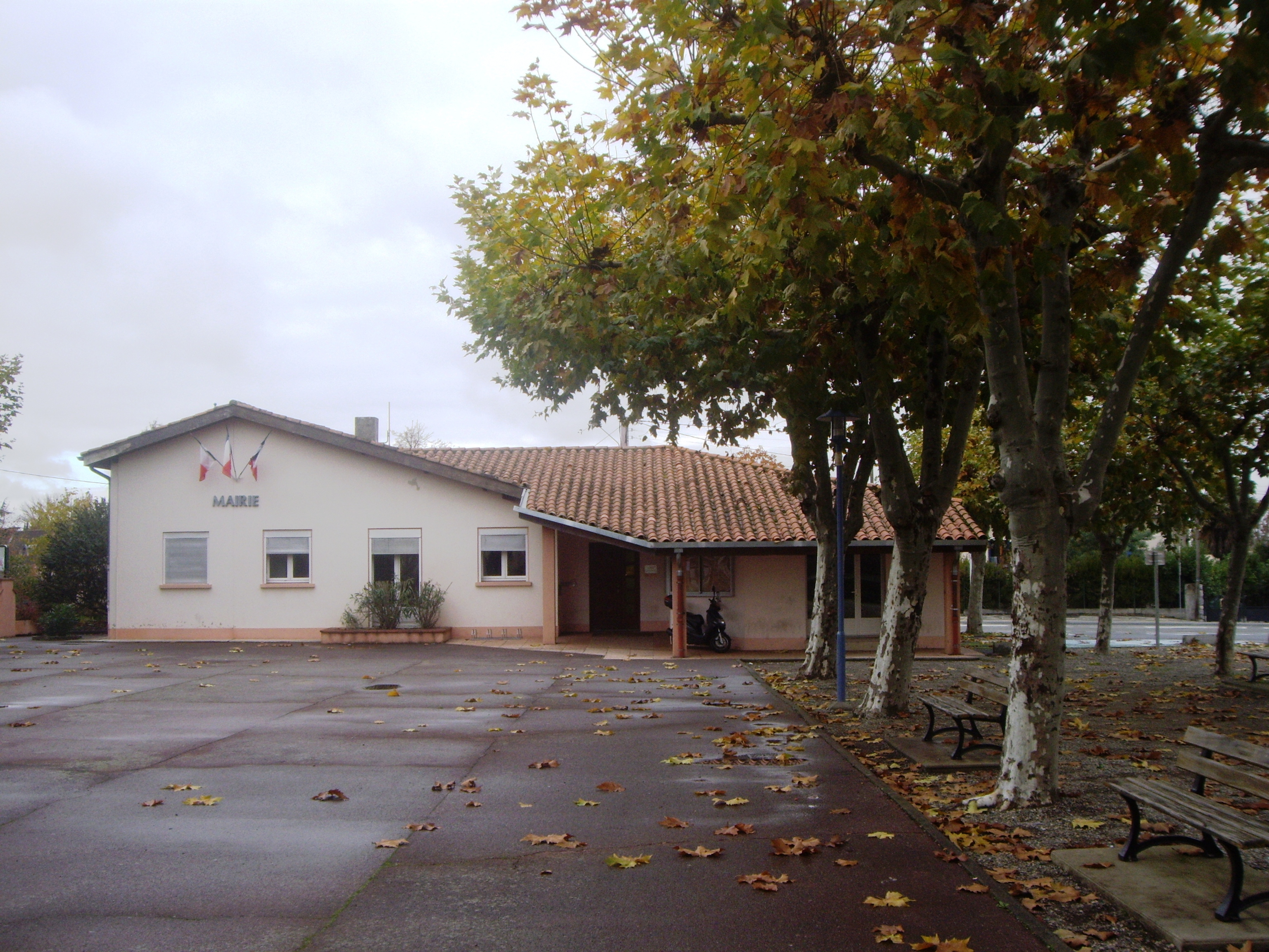 La mairie de Fonbeauzard.